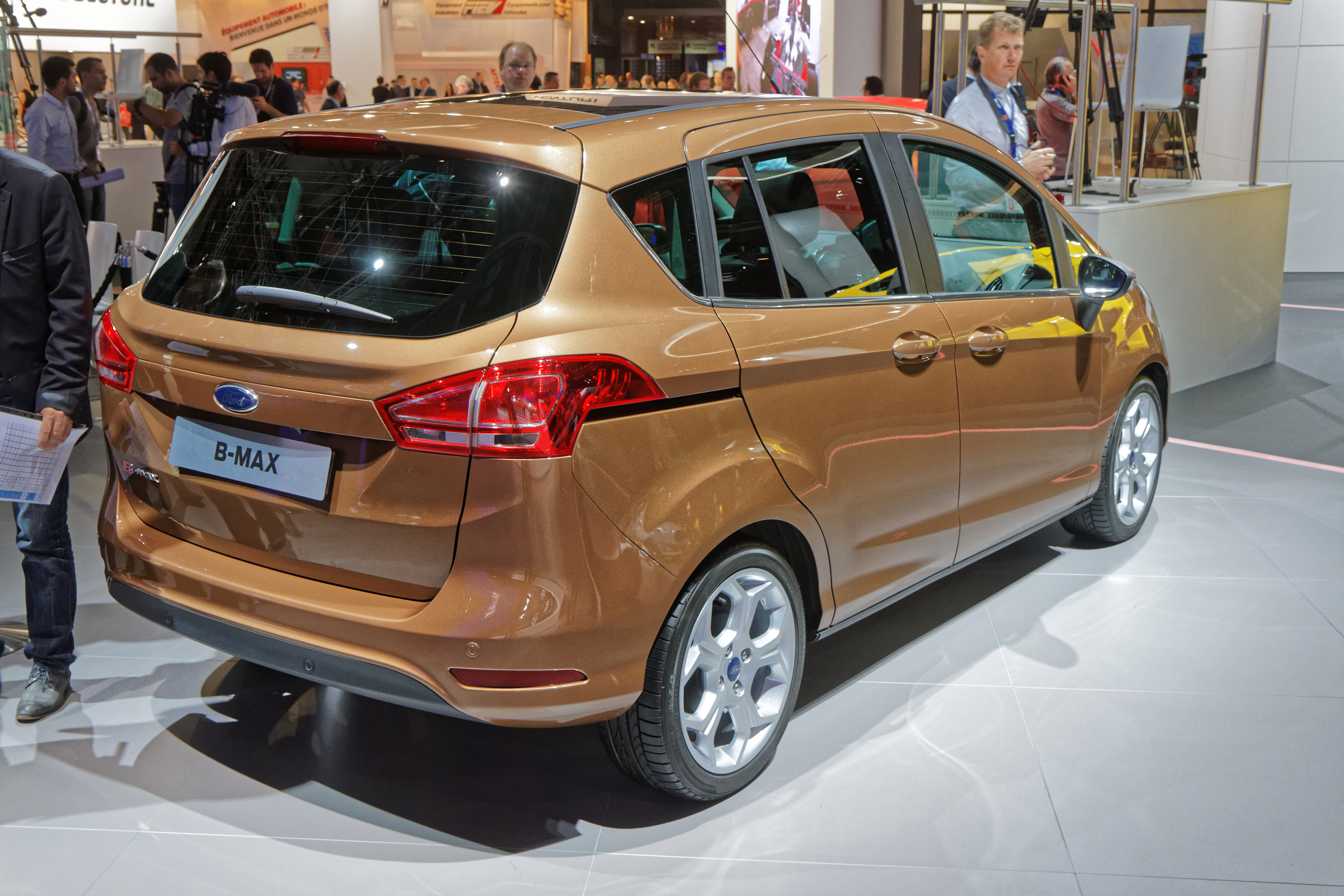 Une Ford B-MAX présentée lors du mondial de l'automobile de Paris 2014.